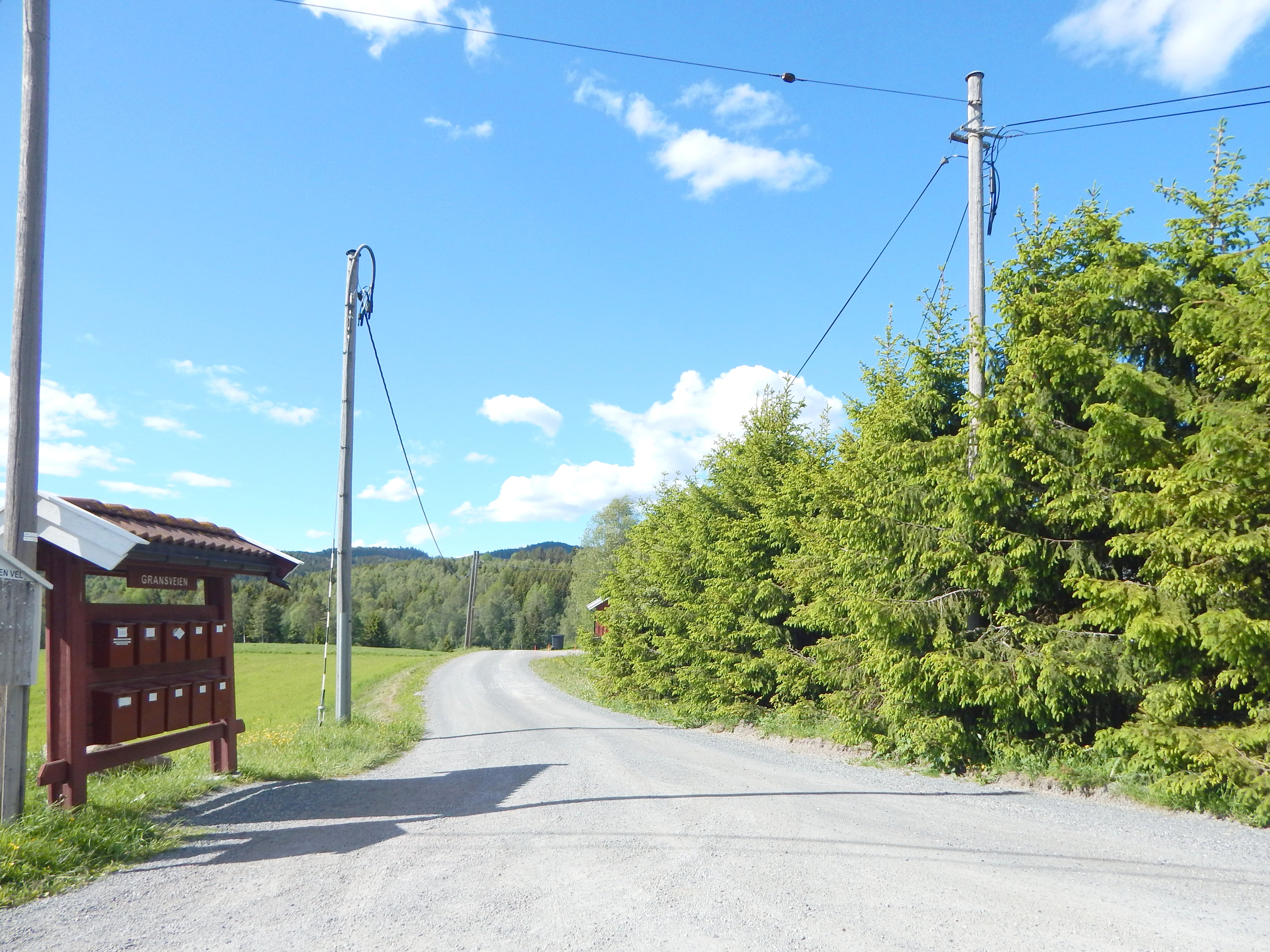 Gransveien